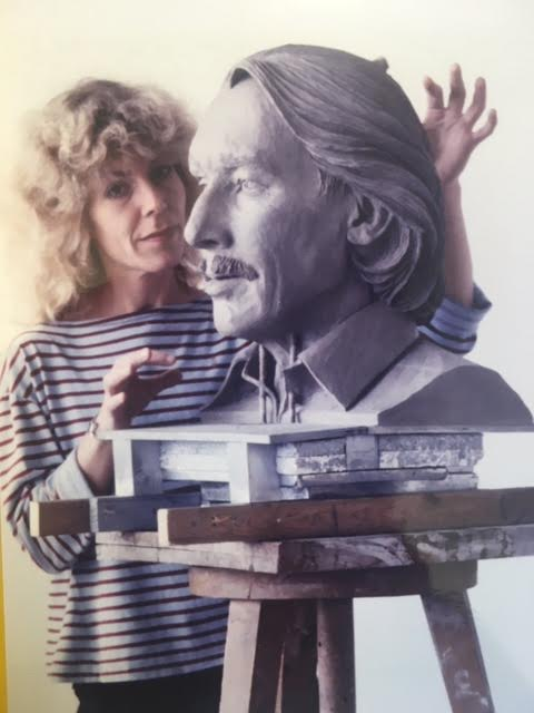 Tina Torhamn skulpterar modellen Staffan Torhamn 1989, foto H Johansson